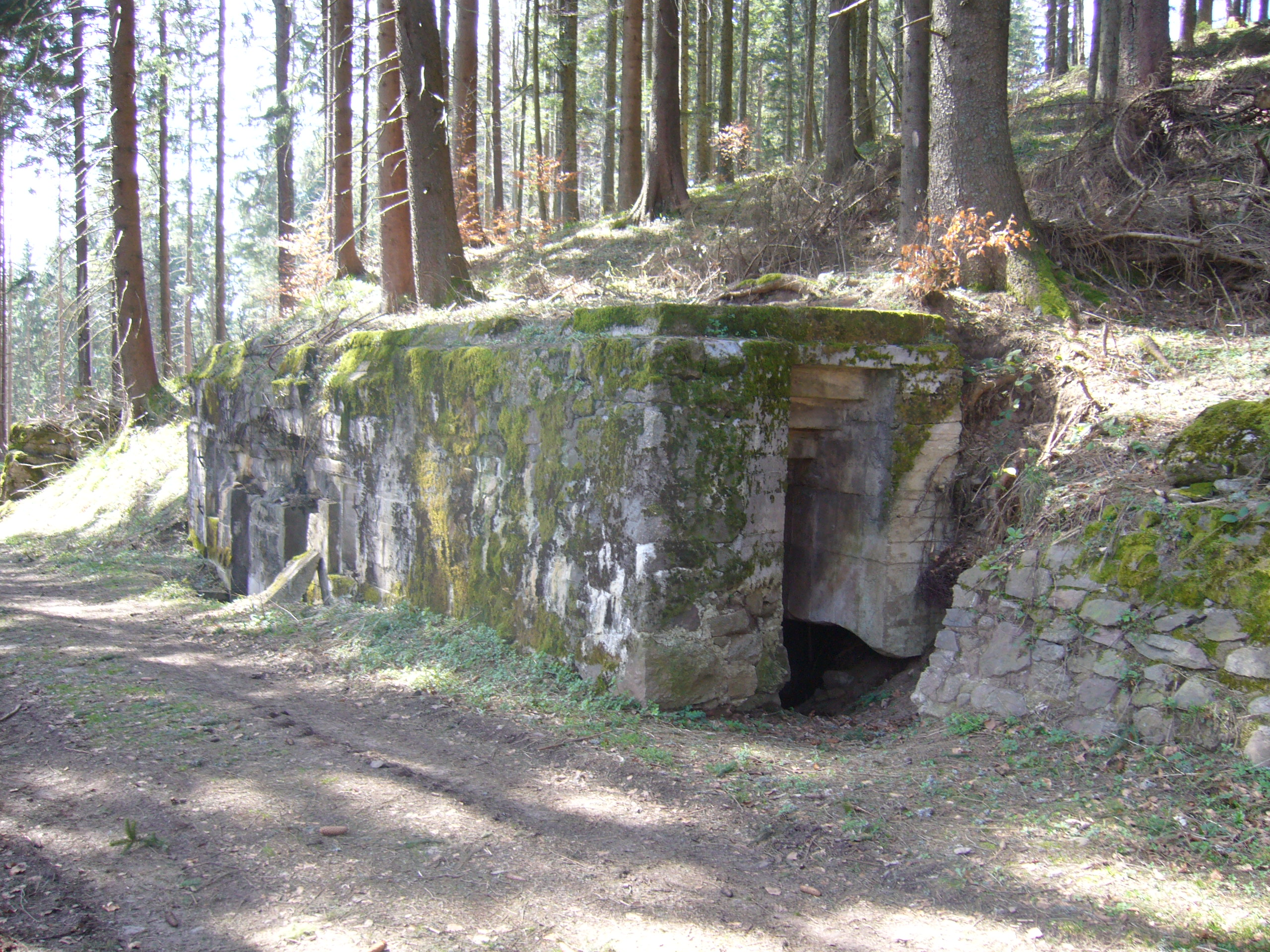 Sainte Marie-aux-Mines 127.JPG